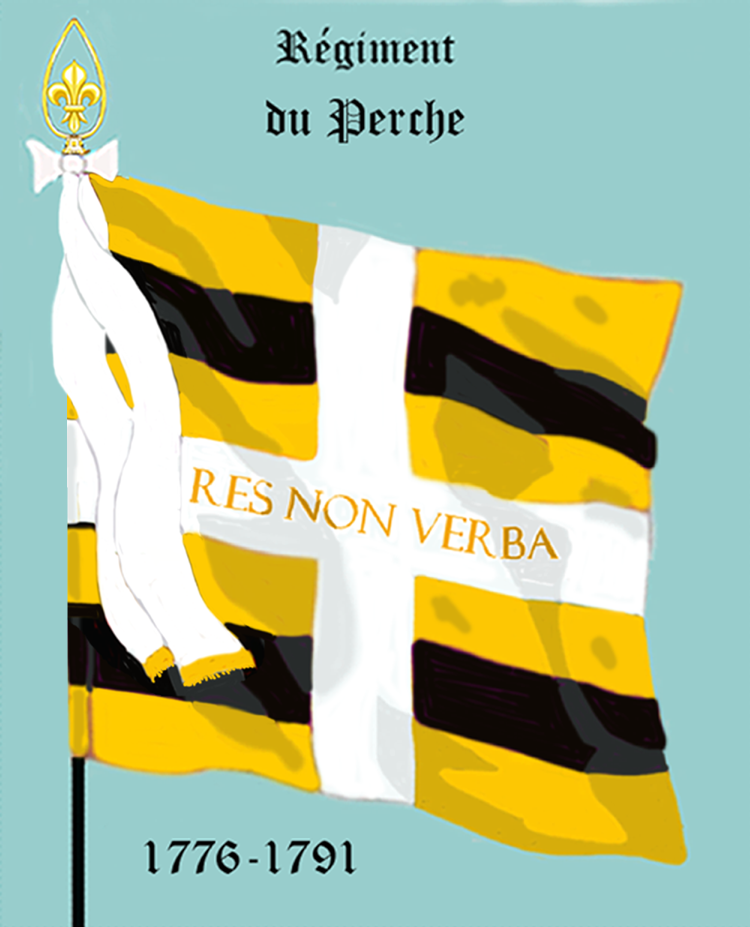 Ordonnanzfahne eines königlich französischen Infanterie-Regiments. - Entnommen und überarbeitet aus: „LES UNIFORMES ET LES DRAPEAUX DE L'ARMÉE DU ROI“ Marseille 1899. (Drapeau d'Ordonnance d' un régiment française d'infanterie royale.)